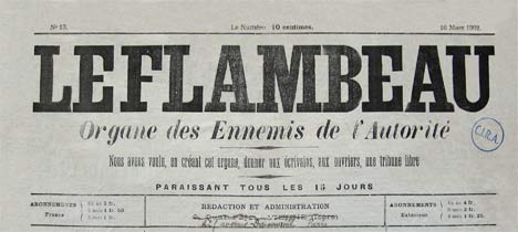 Journal bi-mensuel "Le Flambeau Organe des ennemis de l'autorité". Sa tribune est ouverte à toutes les opinions libertaires, Georges Butaud qui en est le gérant